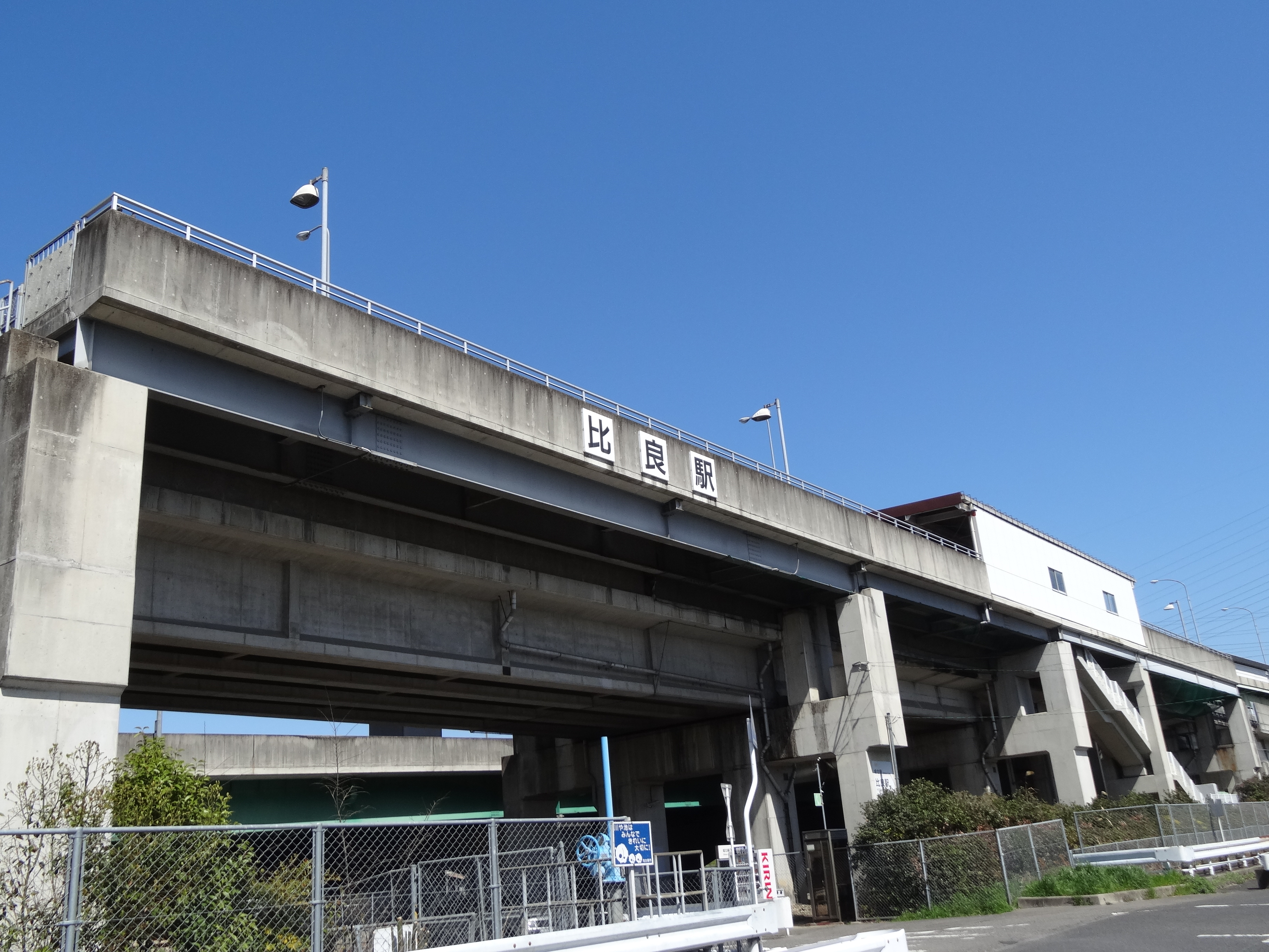 比良駅（東海交通事業城北線）